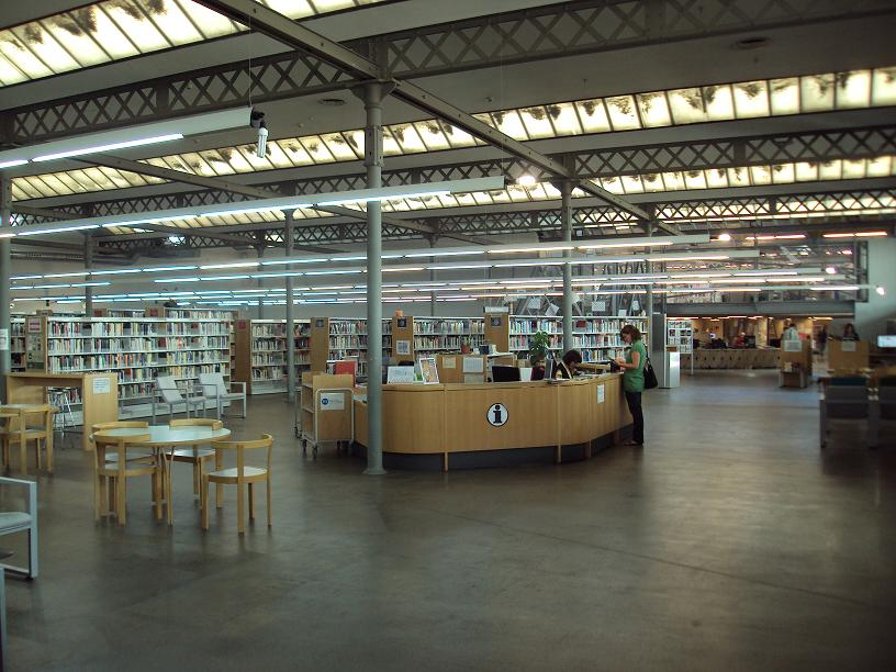 Sala d'Adults de la Biblioteca Can Casacuberta